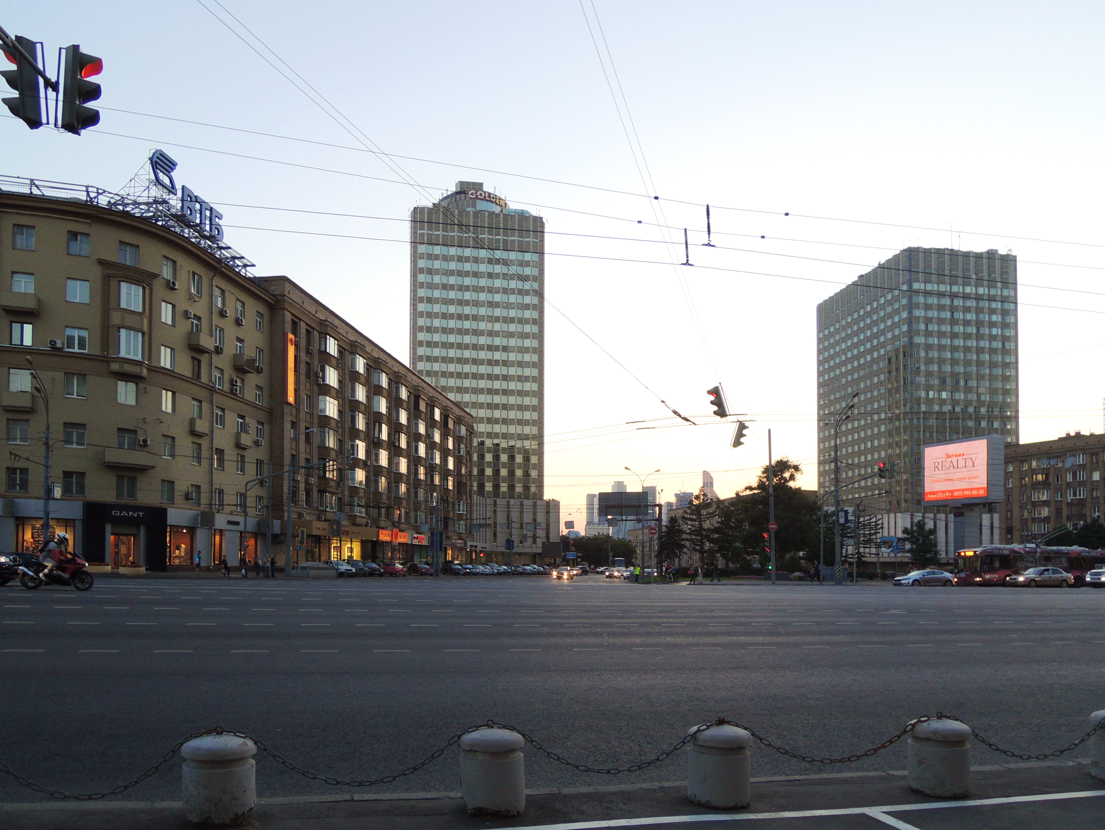 Смоленская-Сенная площадь